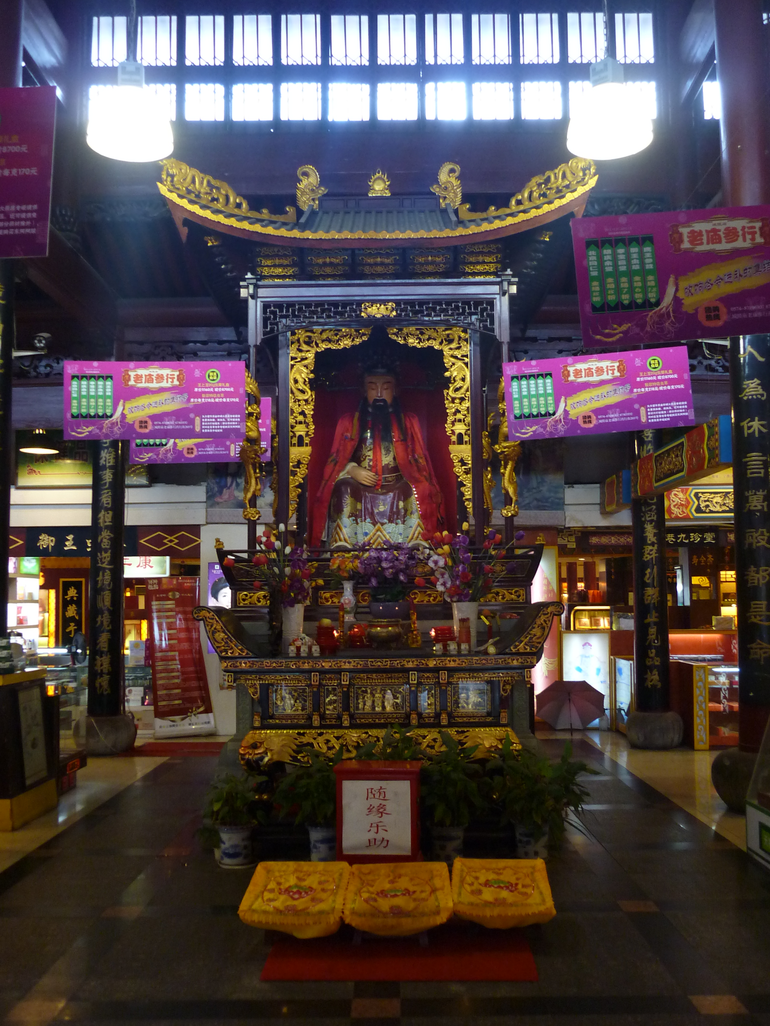 宁波府城隍庙